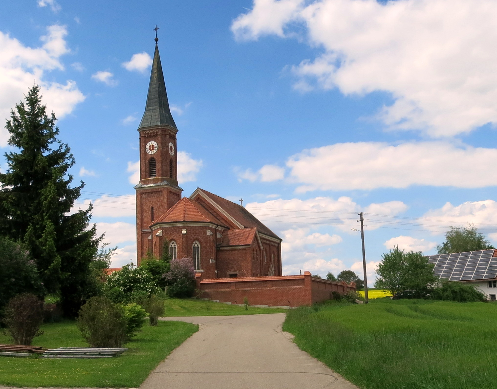 Eine schön gestaltete neugotische Filialkirche, die in gutem Zustand ist.